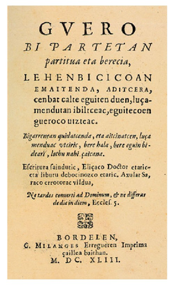 axularren lehen edizioa